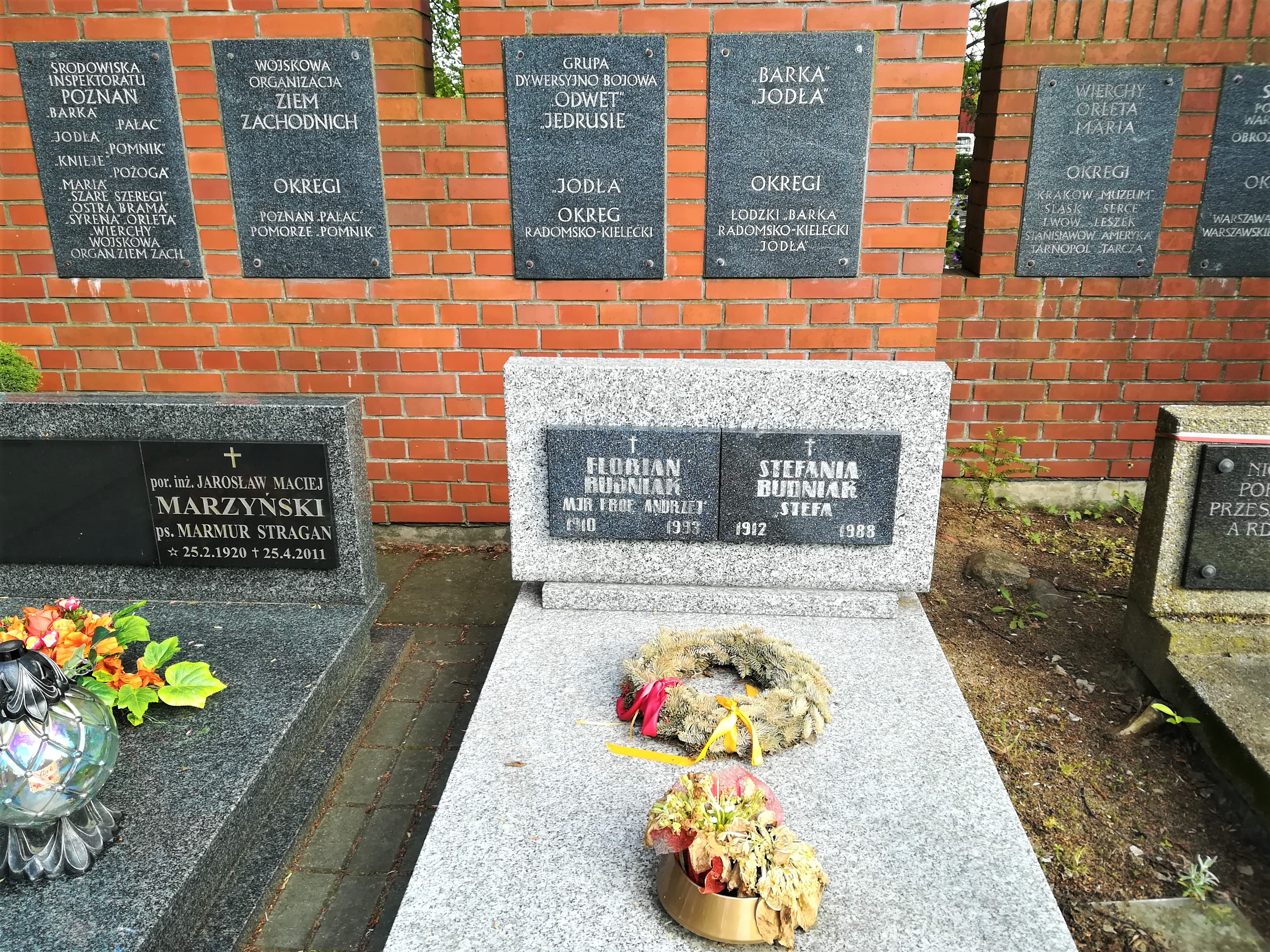 Grób Floriana Budniaka na Junikowie w Poznaniu.